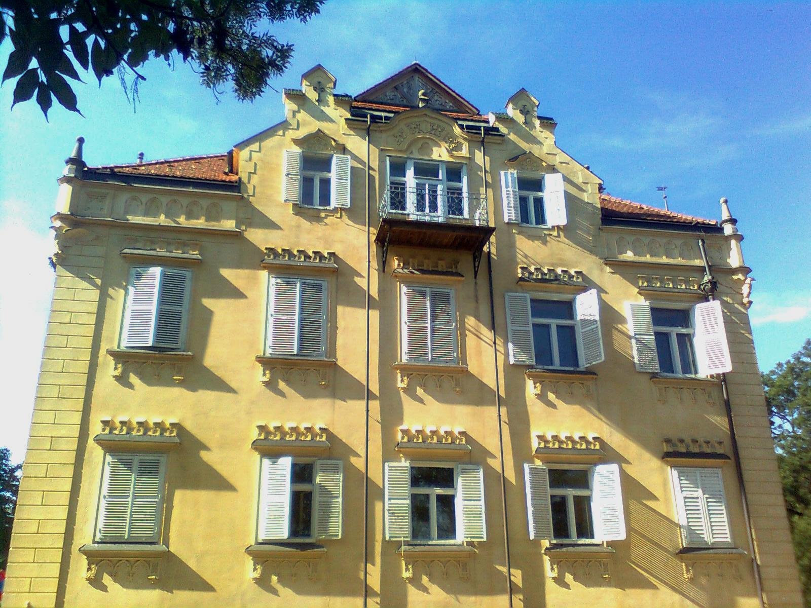 Schloss Lustbühel in Graz